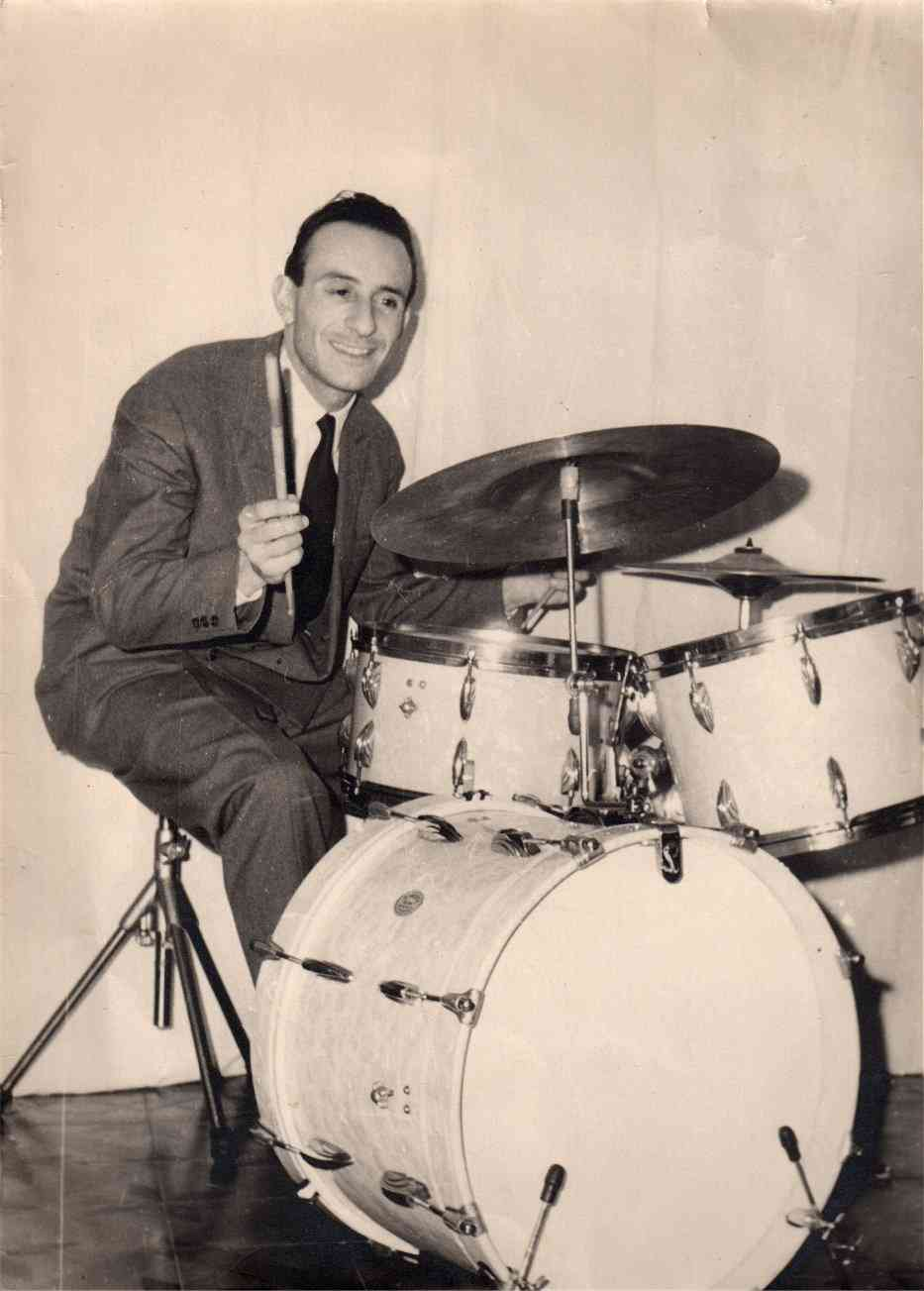 Gigi Allievi alla batteria